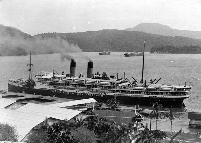 Repronegatief. 'Van Sabang tot Merauke'; zo begon een bekende regel. Tussen Sabang in het uiterste noordwesten en Merauke in het verste zuidoosten (Nieuw-Guinea) strekte zich in de 20e eeuw Nederlands-Indië uit. Sabang was net als Medan een jonge vestiging en pas sinds 1893 onder koloniaal gezag,. Met zijn fraaie baai en zijn kolenstation (1895) ontwikkelde het zich snel tot een belangrijke haven. In 1898 kreeg het een 2800-tons dok. Voor veel buitenlanders was Sabang de eerste kennismaking met Indië. De Stoomvaart Maatschappij Nederland, eigenaar van dit schip, onderhield een veertiendaagse maildienst op Indië vanuit Amsterdam. (P. Boomgaard, 2001). S.S. 'Jan Pieterszoon Coen' gemeerd aan de handelssteiger te Sabang op het eiland We, Noord-Sumatra